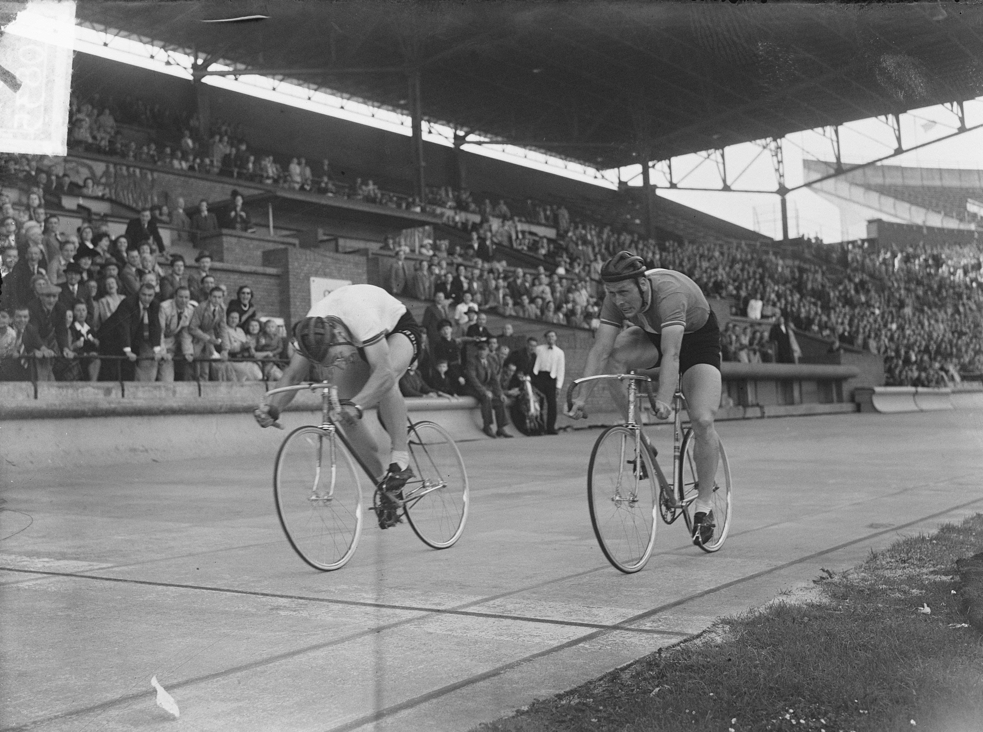 Collectie / Archief : Fotocollectie Anefo Reportage / Serie : [ onbekend ] Beschrijving : Arie van Vliet klopt Derksen in sprints voor profs Datum : 21 juli 1950 Trefwoorden : wielrenners Persoonsnaam : Derksen, Vliet, Arie van Fotograaf : Pot, Harry / Anefo Auteursrechthebbende : Nationaal Archief Materiaalsoort : Glasnegatief Nummer archiefinventaris : bekijk toegang 2.24.01.09 Bestanddeelnummer : 904-0835